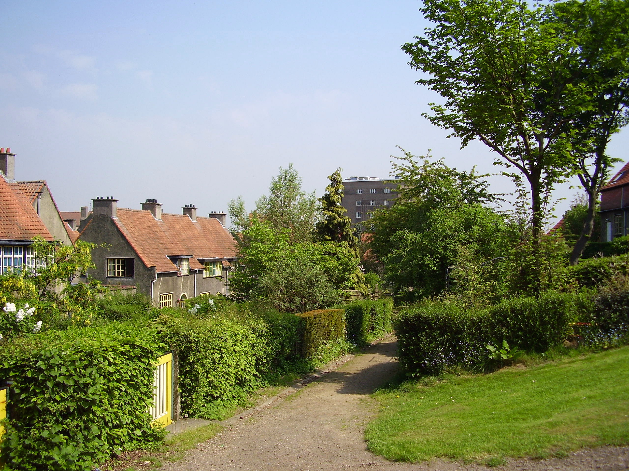 Cité-jardin Le Logis, Watermael-Boitsfort (Bruxelles)